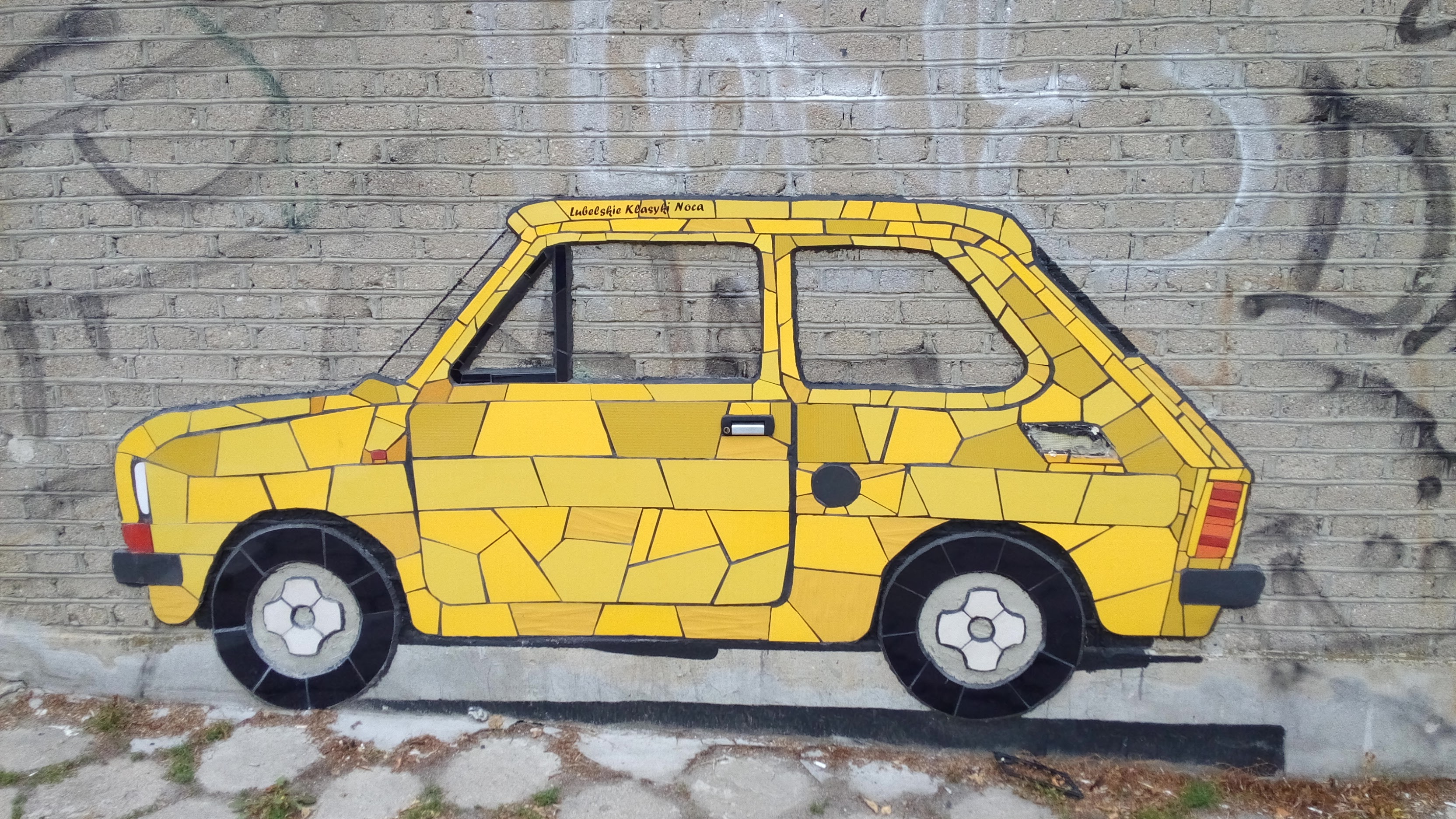 Mozaika z potłuczonej porcelany przedstawiająca żółtego Fiata126p wykonana na ścianie garażu przy ulicy Balladyny w Lublinie